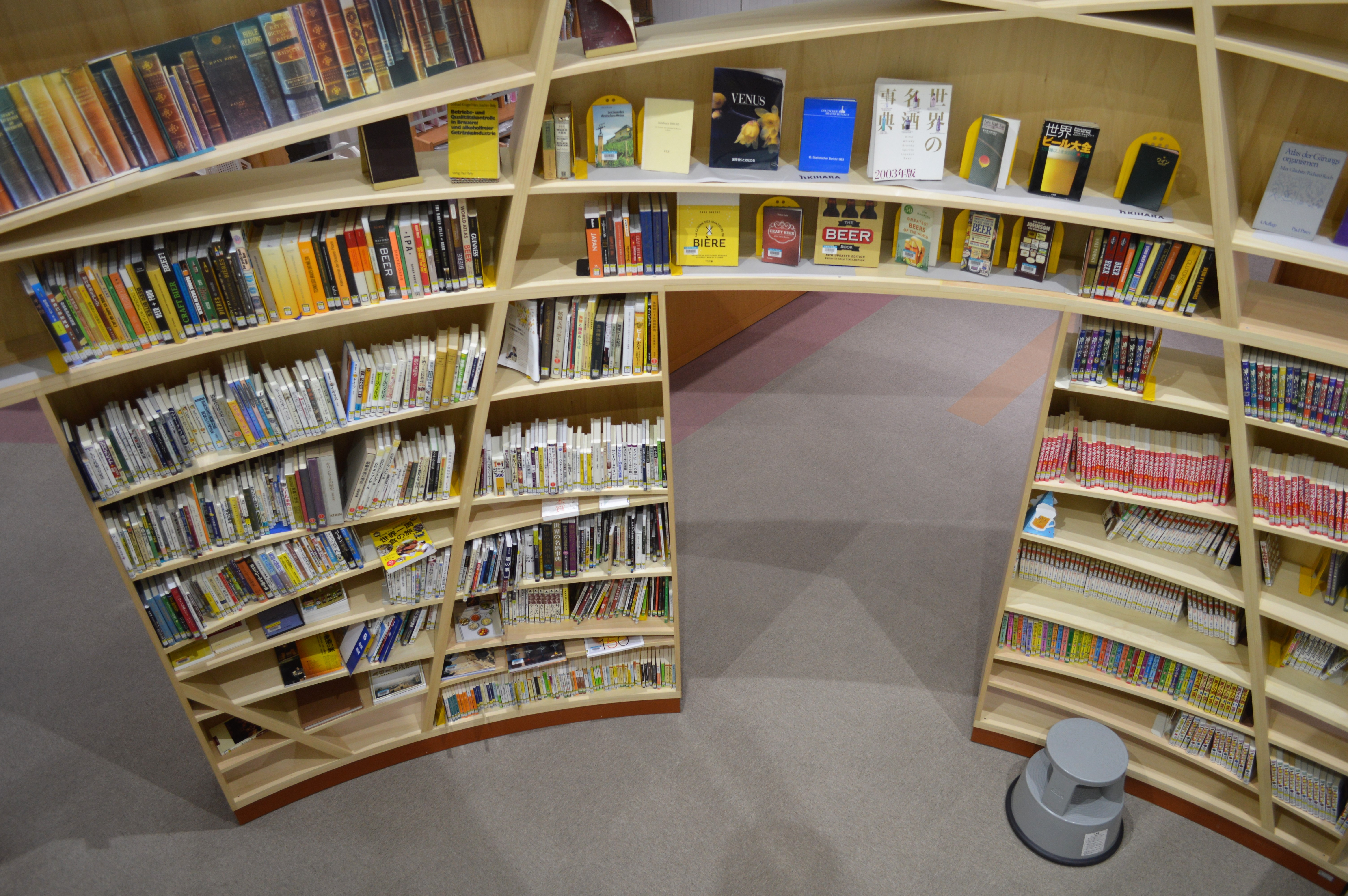 愛知県清須市の清須市立図書館。「日本一ビールに詳しくなるための図書コーナー」。